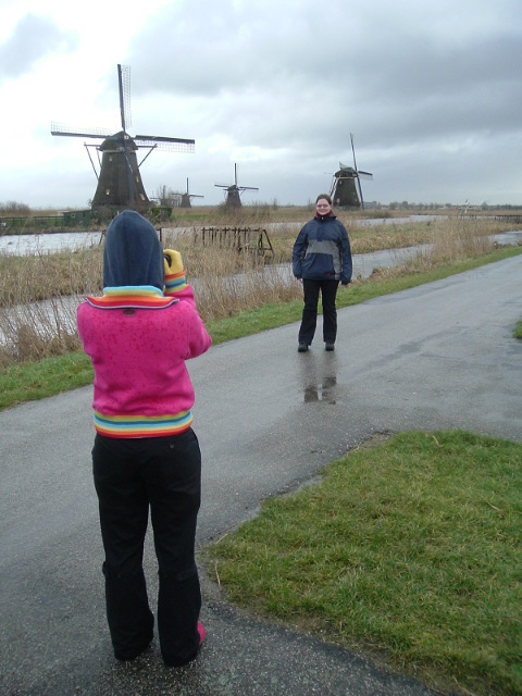 M. Geurts Ottersum